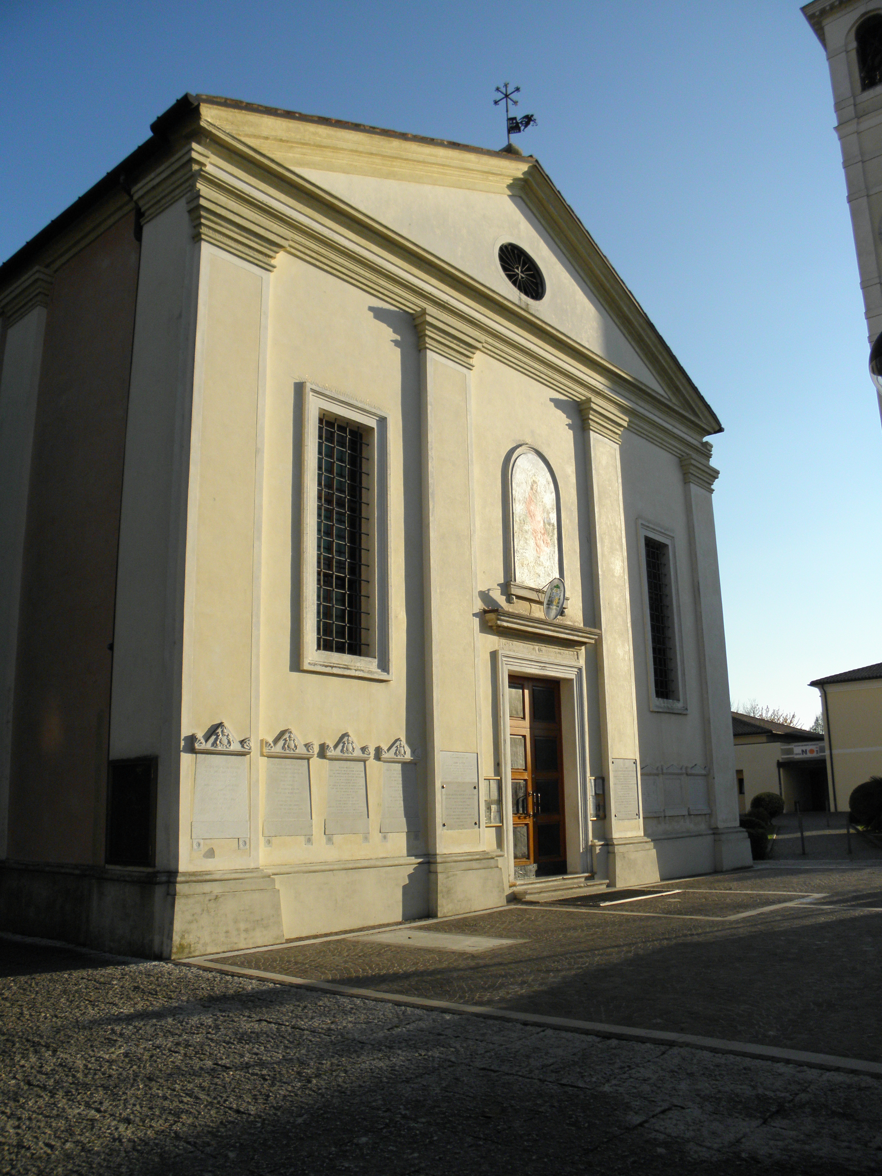 Silea, la chiesa parrocchiale di San Michele Arcangelo.